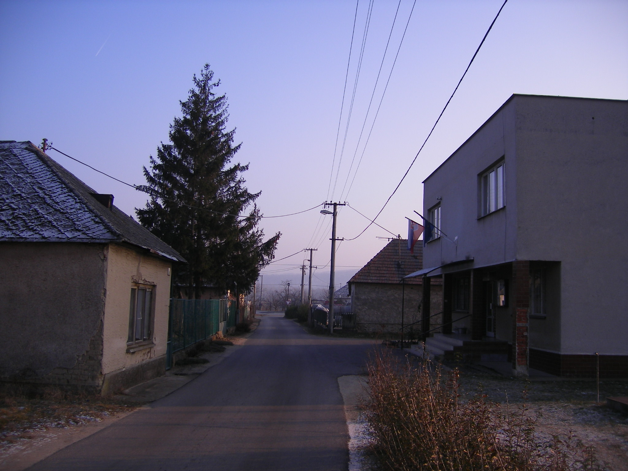 Dunaradvány - utcakép (jobboldalt a községháza)